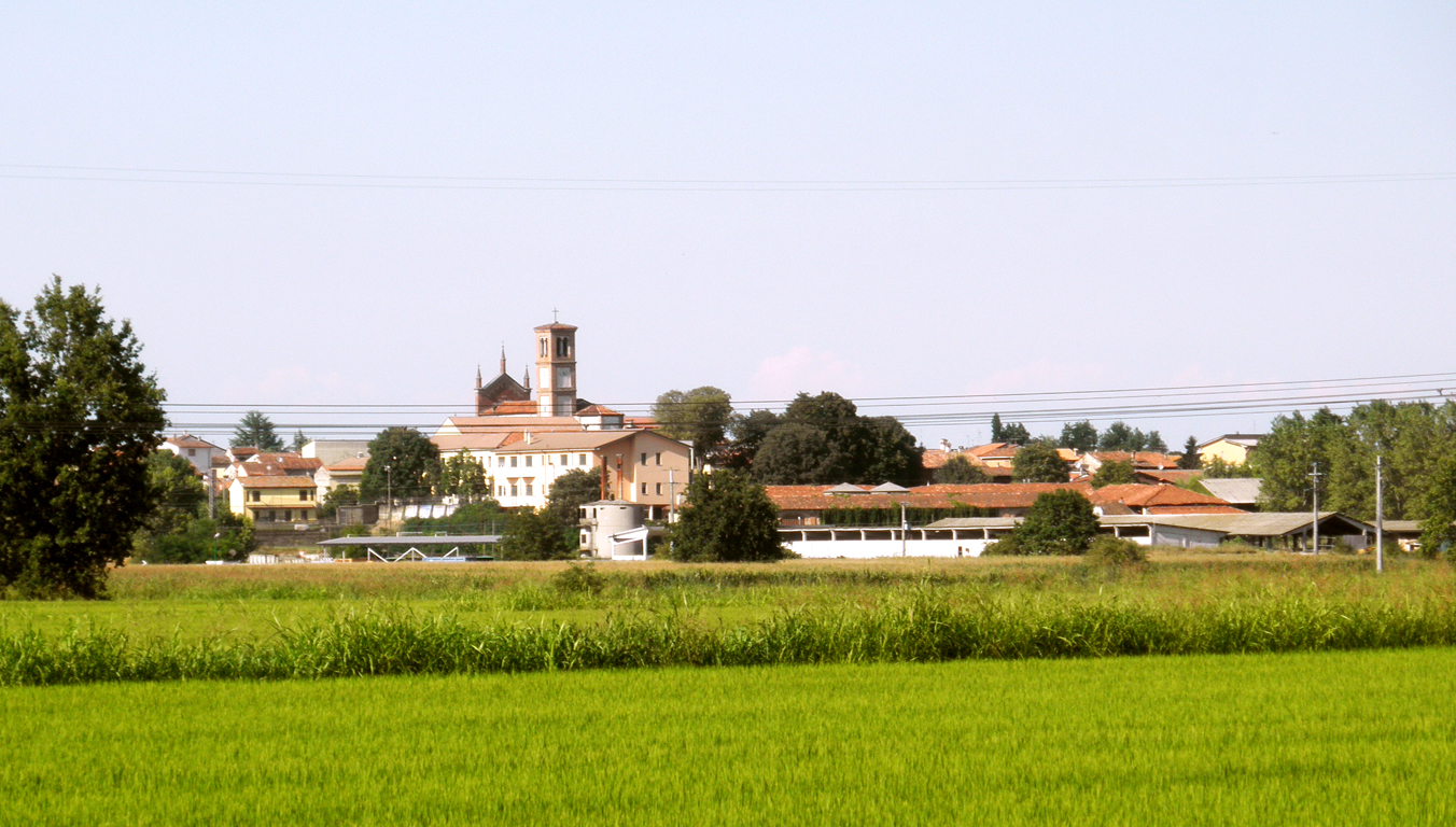 Panorama di Senna Lodigiana.